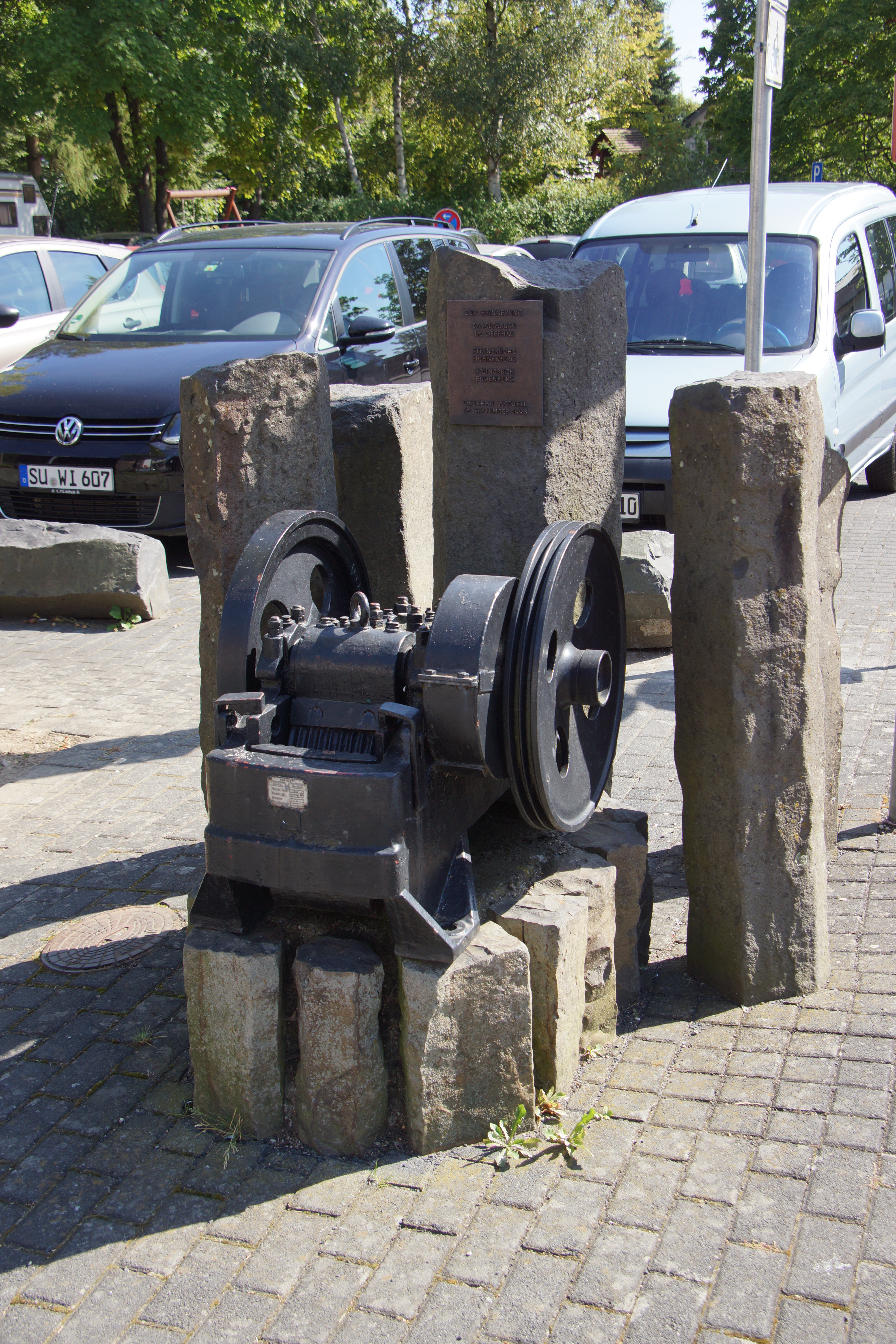 Denkmal in Eudenbach zur Erinnerung an die Basaltsteinbrüche Hühnerberg und Eudenberg/Tongrube Eudenbach